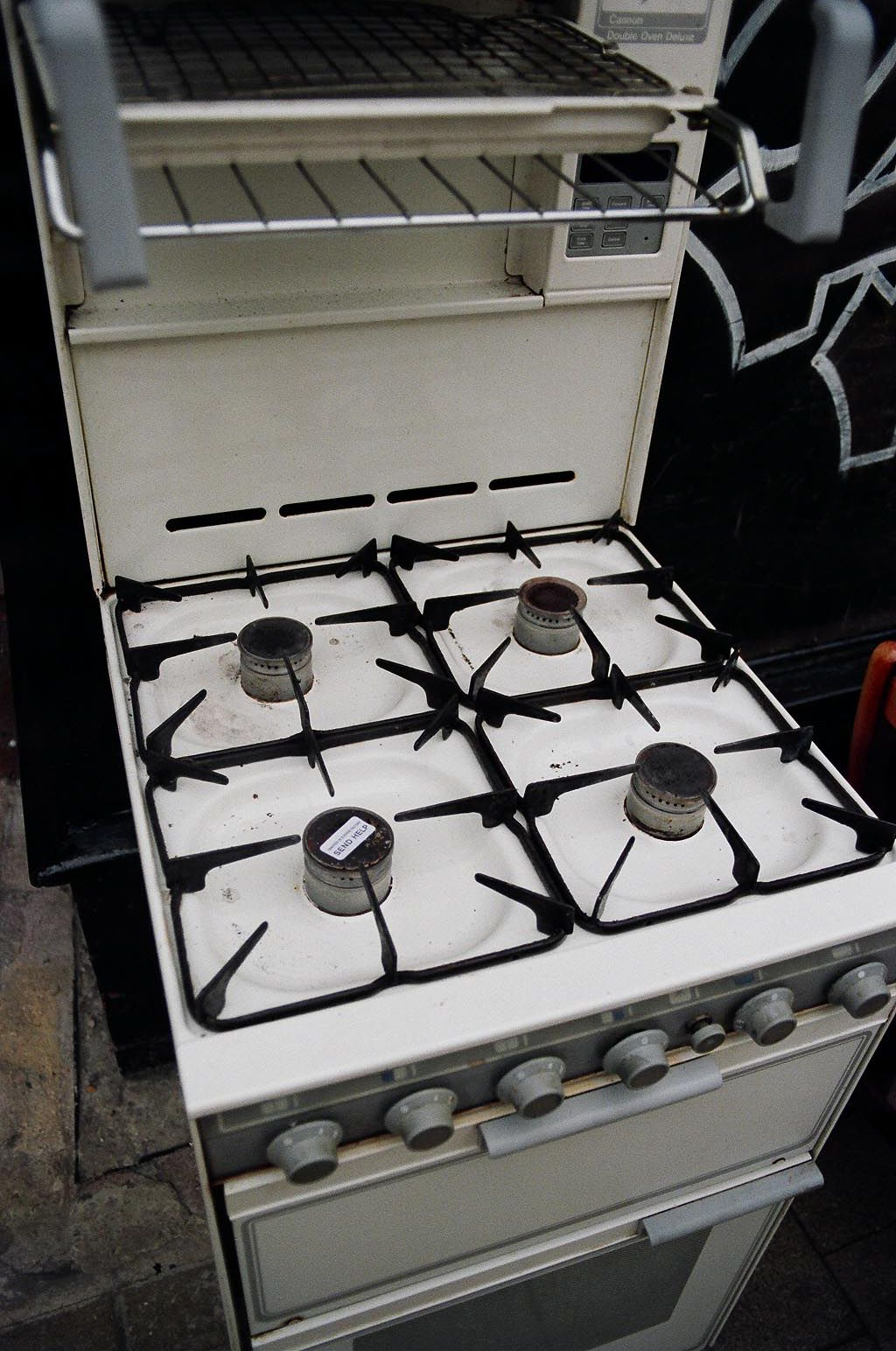 תנור חשמלי עם כיריים הפועלים על גז טבעי, נקודת הקצה של המערכת.